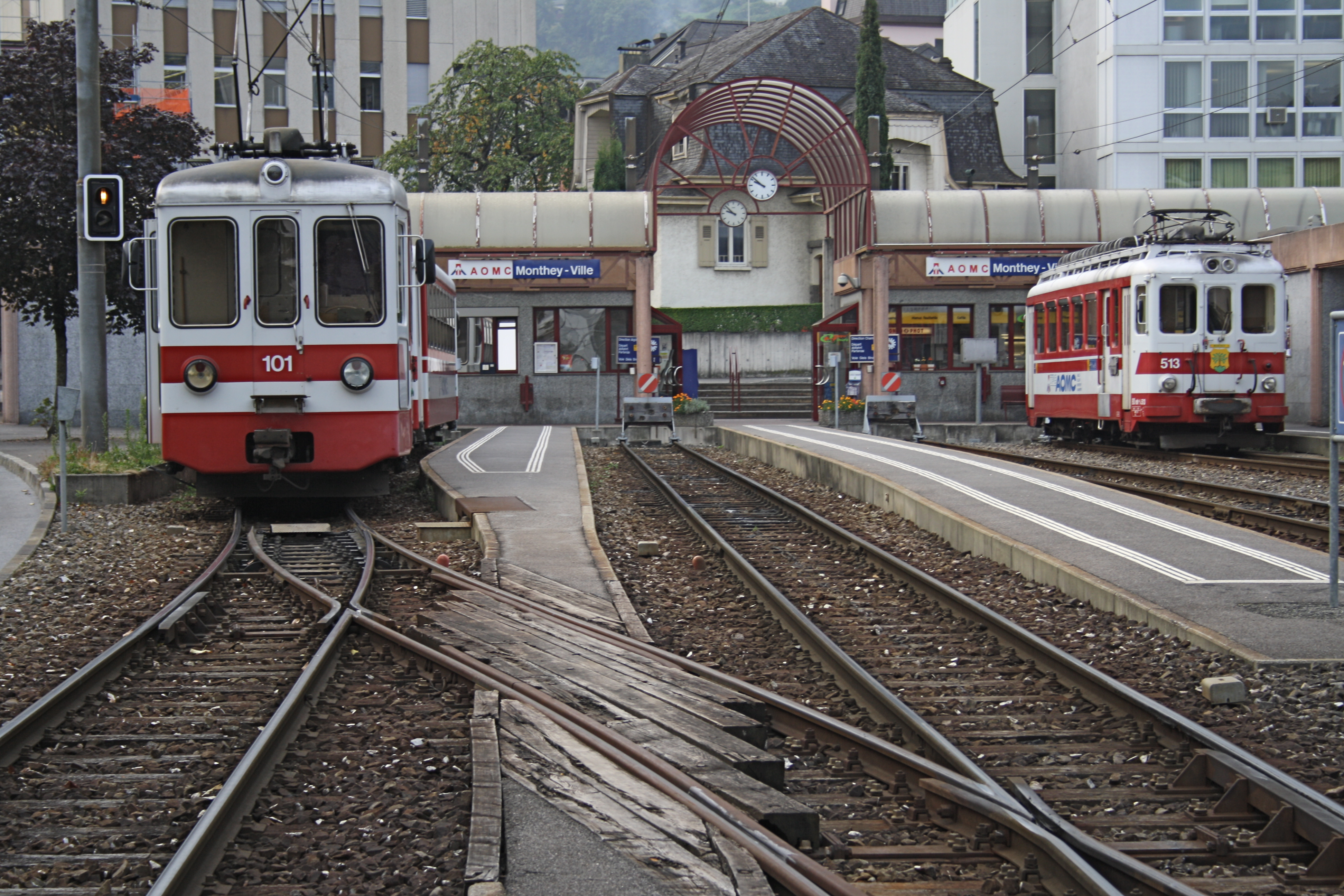 Kopfbahnhof der AOMC in Monthey